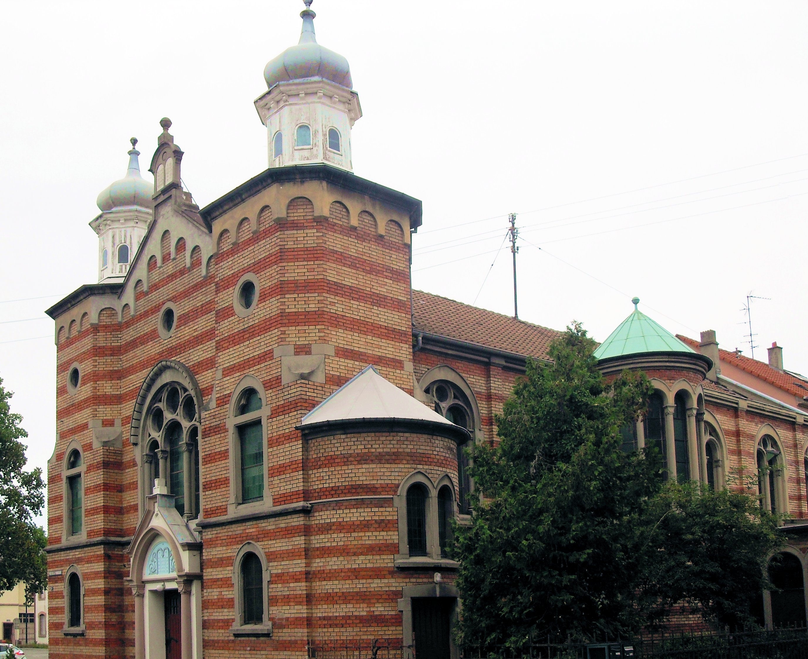 Synagogue de Saint-Louis, côté sud-ouest